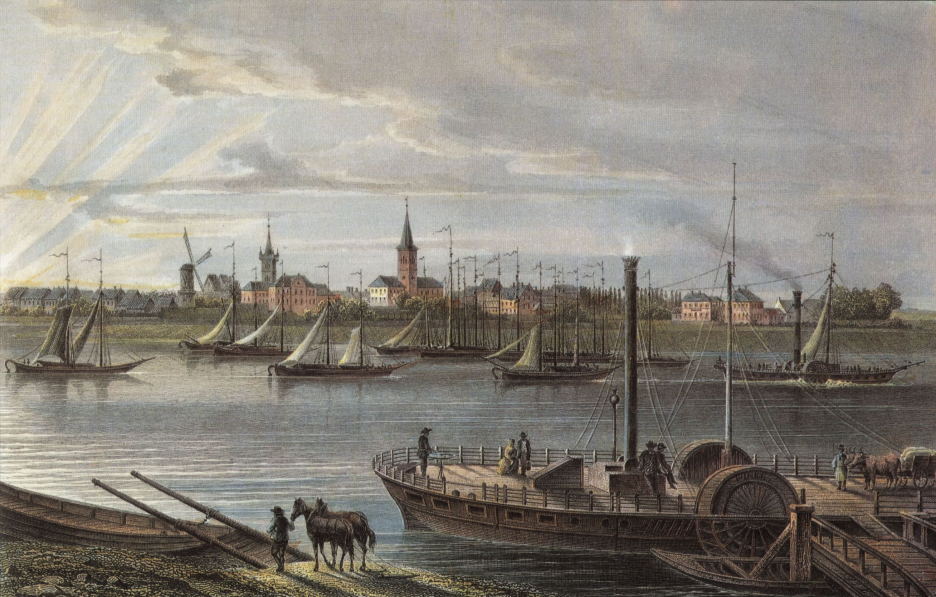 Historische Postkarte von Duisburg Stahlstich, koloriert, von dem Künstler Joseph Maximilian Kolb: Duisburg, Ruhrort, Gesamtansicht um 1845